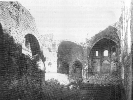 Fanatisme laic i anticatòlic. Ripoll 1835.